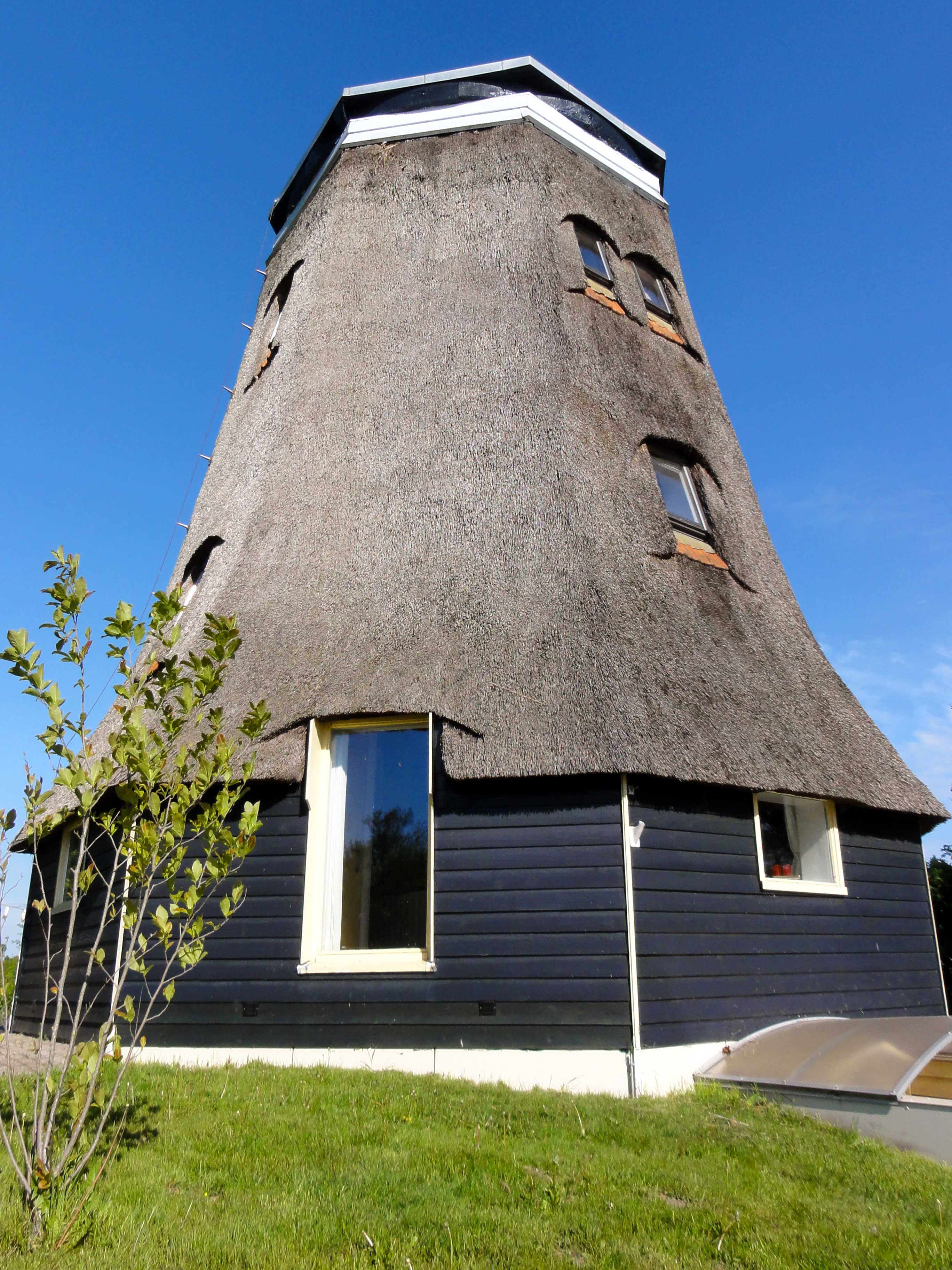 Restant molen Kerkweg 50A Giethoorn (rijksmonument)